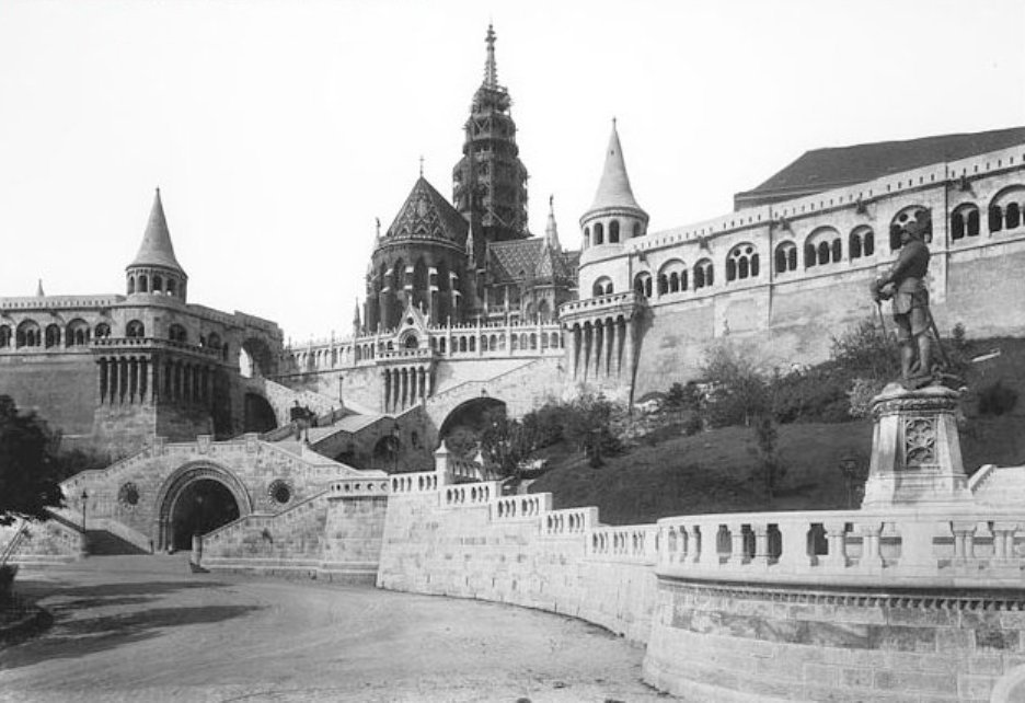 A Halászbástya építése 1903 körül. A háttérben a Mátyás templom átépítése.